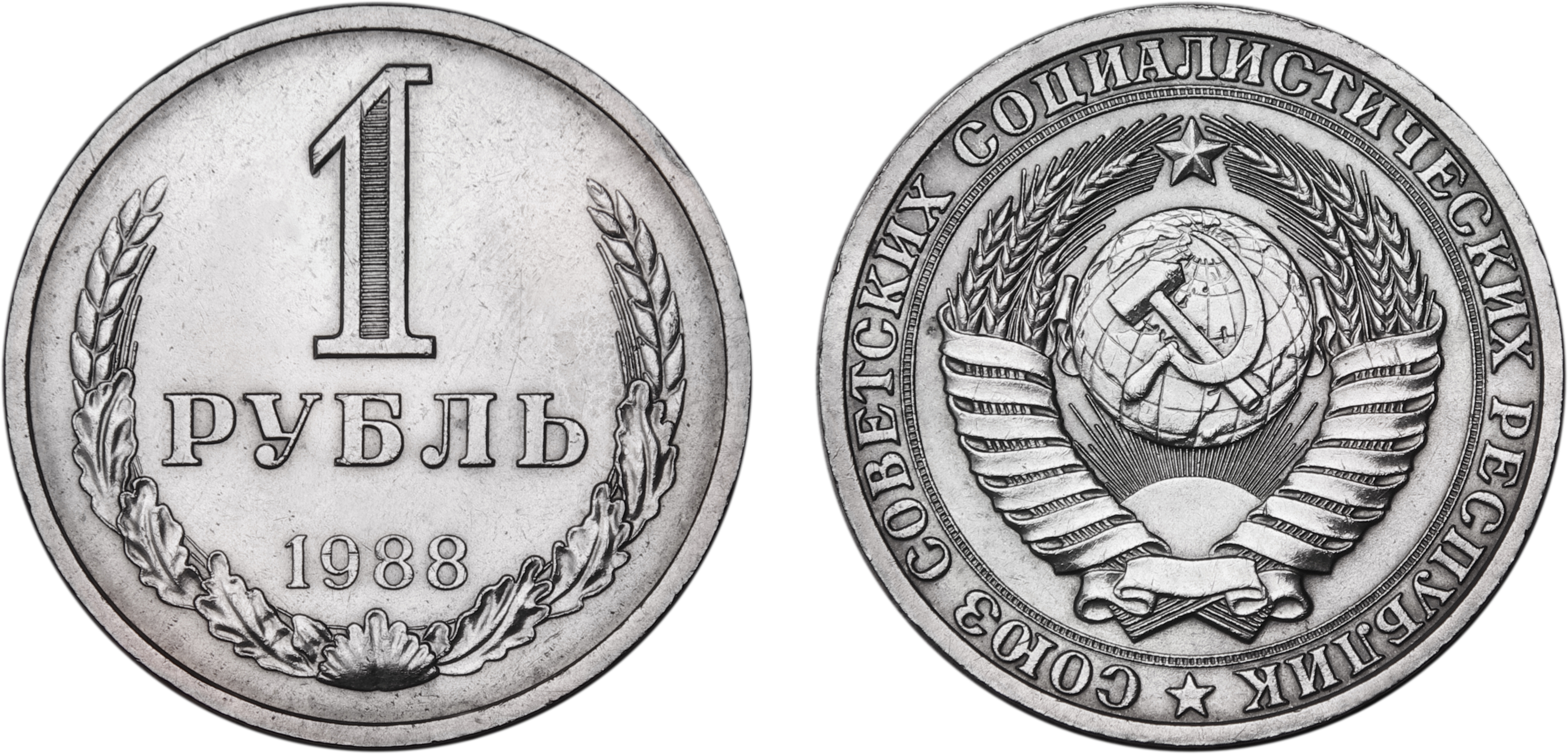 1 рубль 1988 года